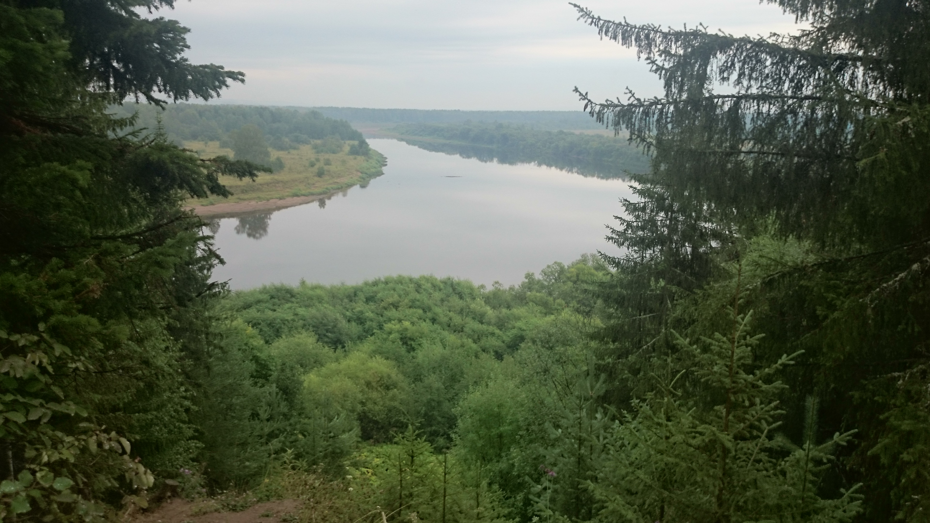 Каргортский, Сыктывдинский район This image is related to the protected area of Russia number 1110297